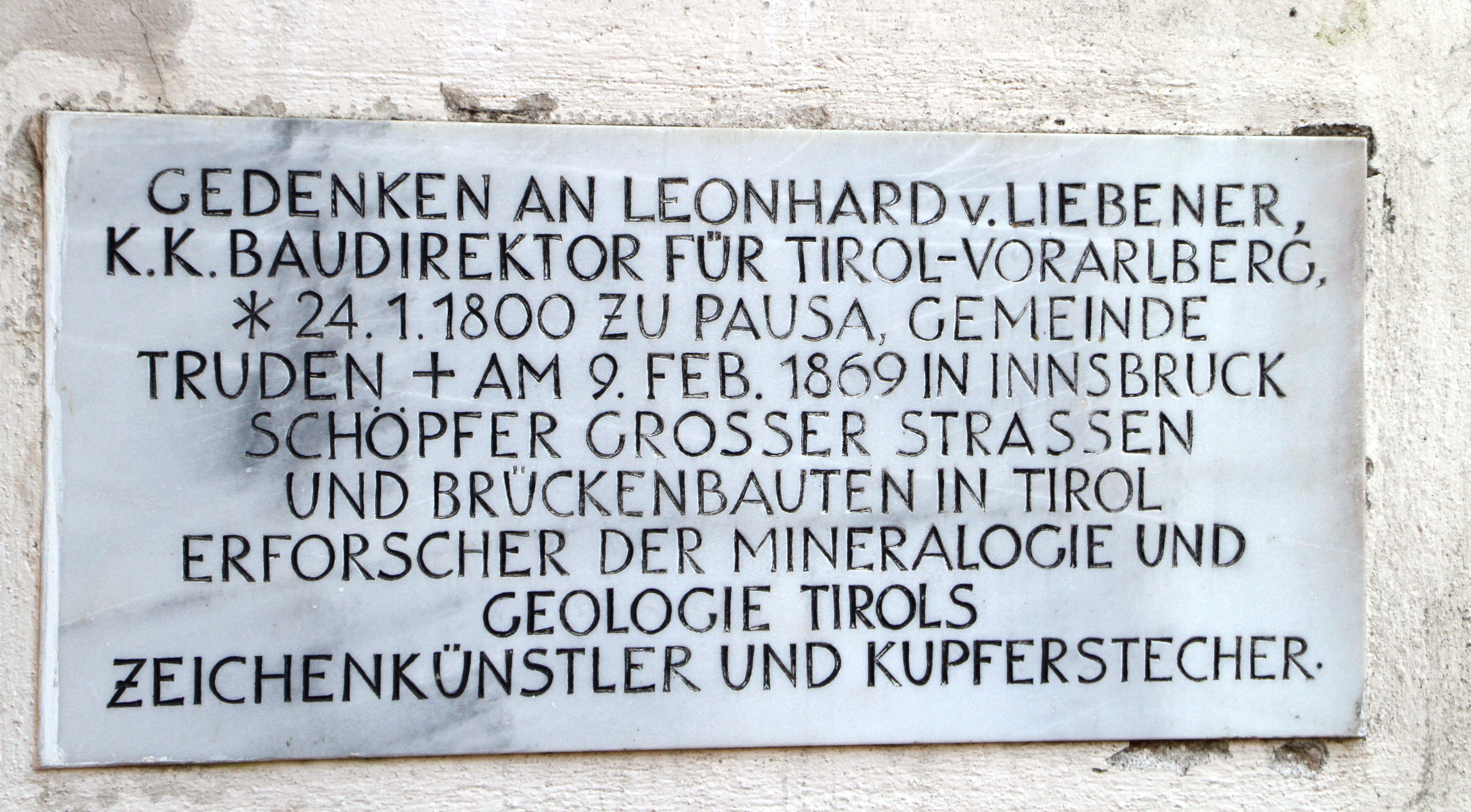 Ingenieur und Geologe